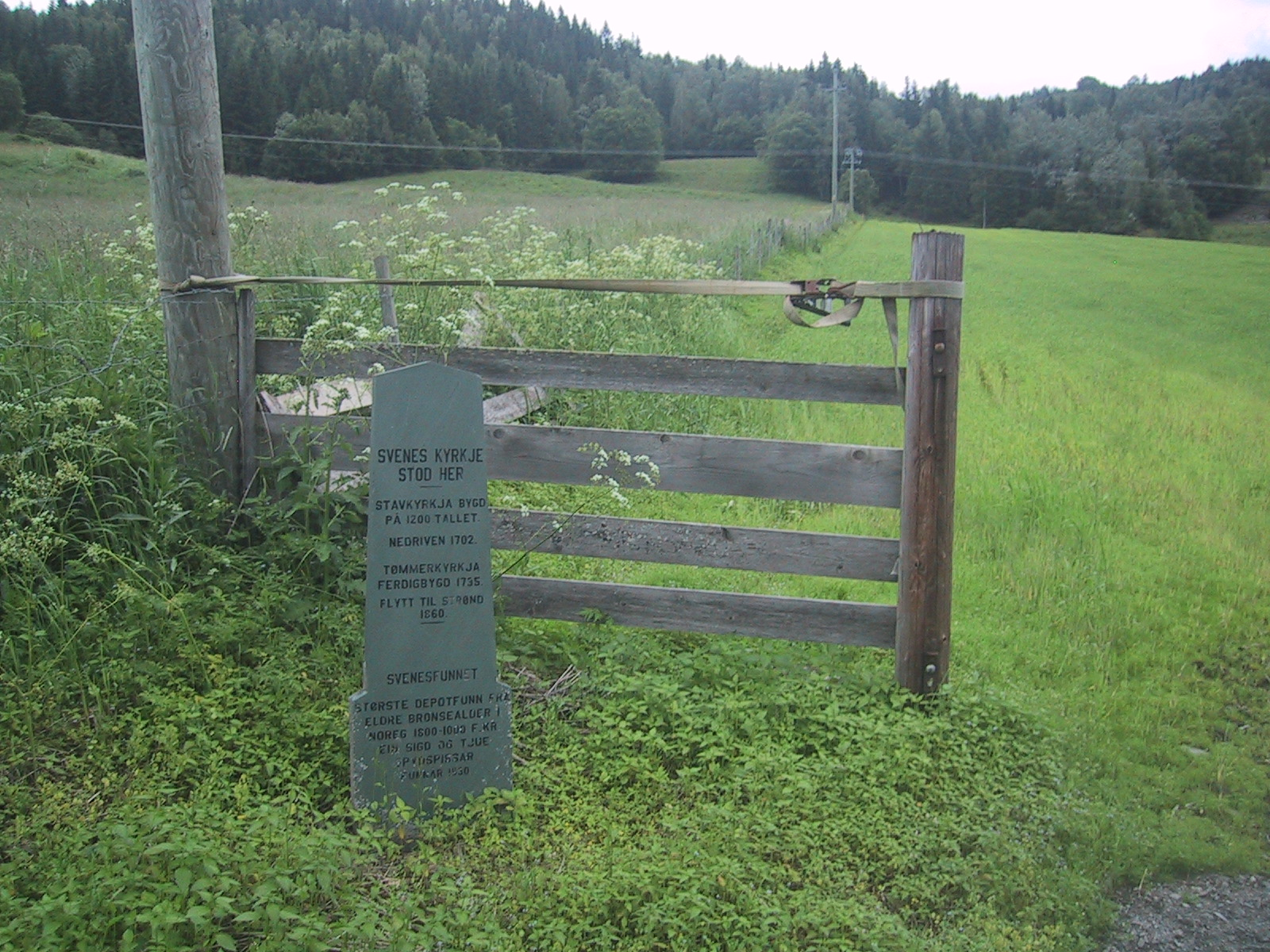 Svenes kirkested, der kirkene stod før dagens kirke ble flyttet til Strand. Foto: Dag Bertelsen, fra Lokalhistoriewiki.